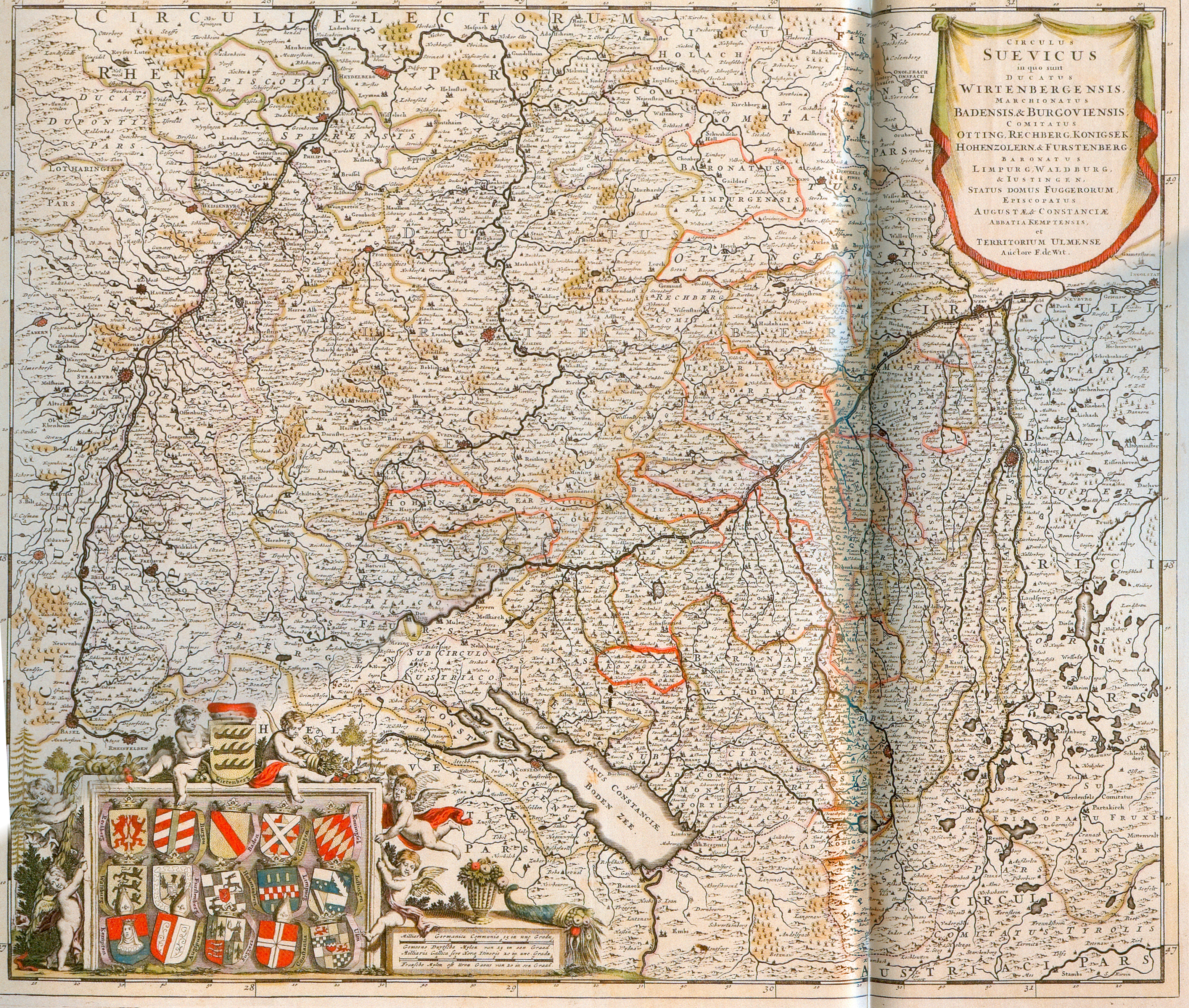 Karte des Schwäbischen Kreises besonders herausgehoben: Herzogtum Württemberg Die Markgrafschaften Baden und Burgau Die Grafschaften Öttingen, Rechberg, Königsegg, Hohenzollern, Fürstenberg Die Freiherrschaften Limpurg, Waldburg, Justingen Das Haus Fugger Die Bischöffe von Augsburg und Konstanz und die Abtei Kempten Die Stadt Ulm